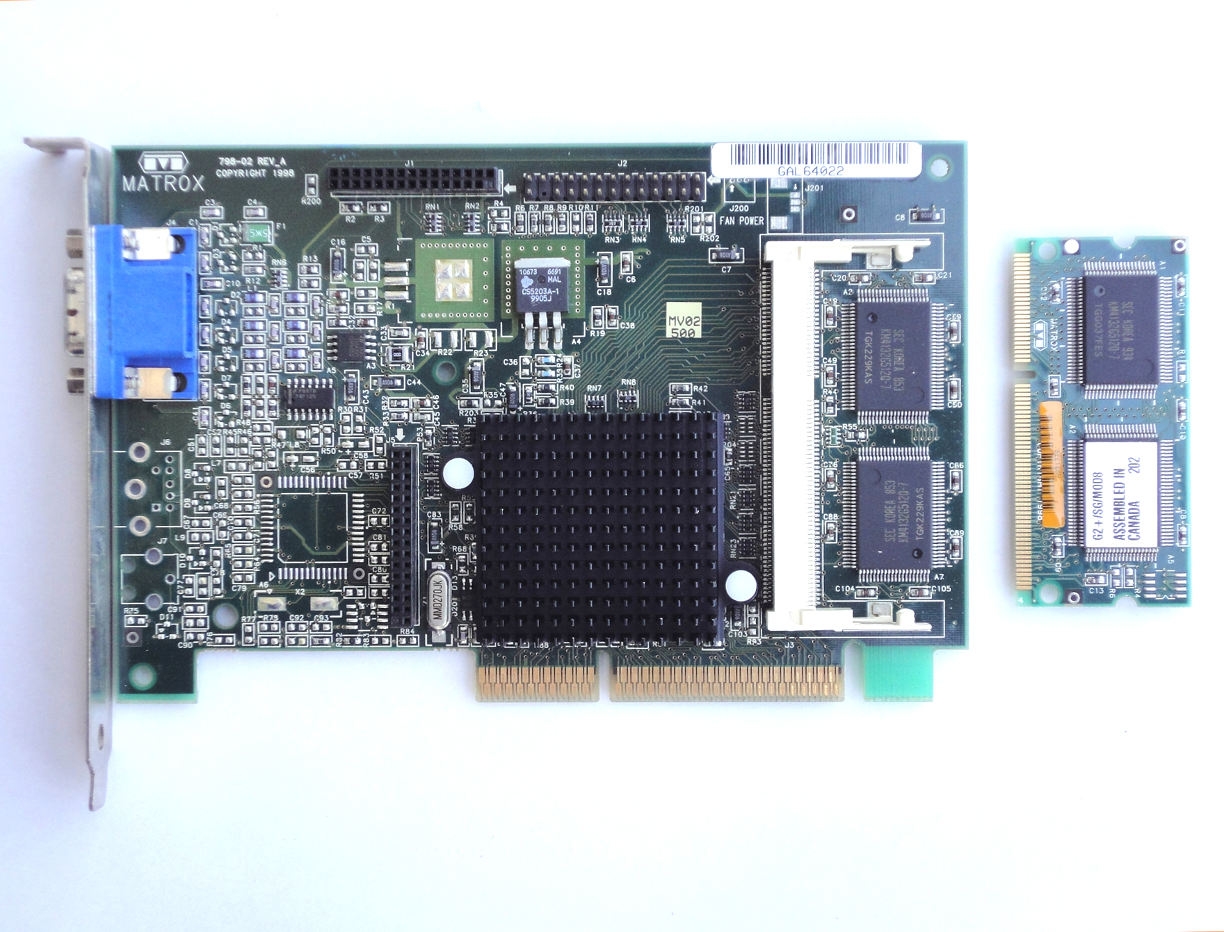 Matrox Millennium G200